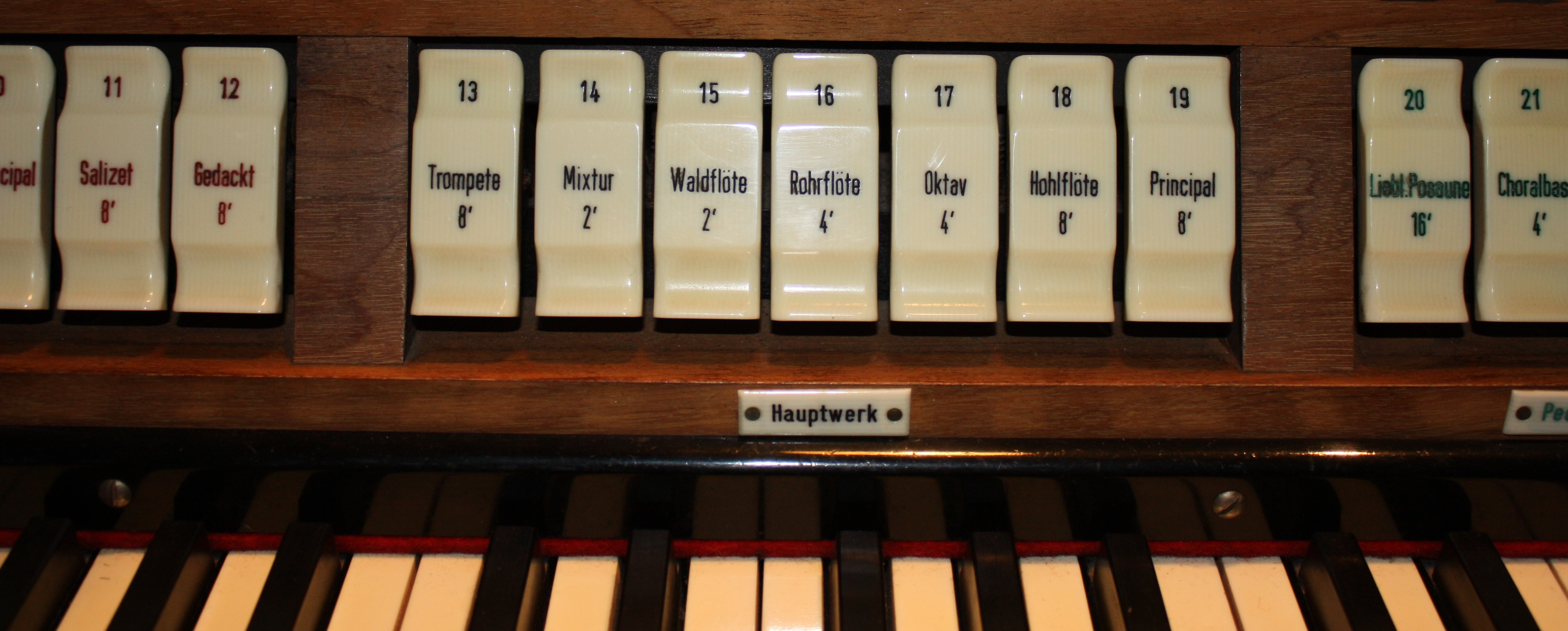 Spieltischdetail der Orgel der Kirche St. Maria (Buchheim)